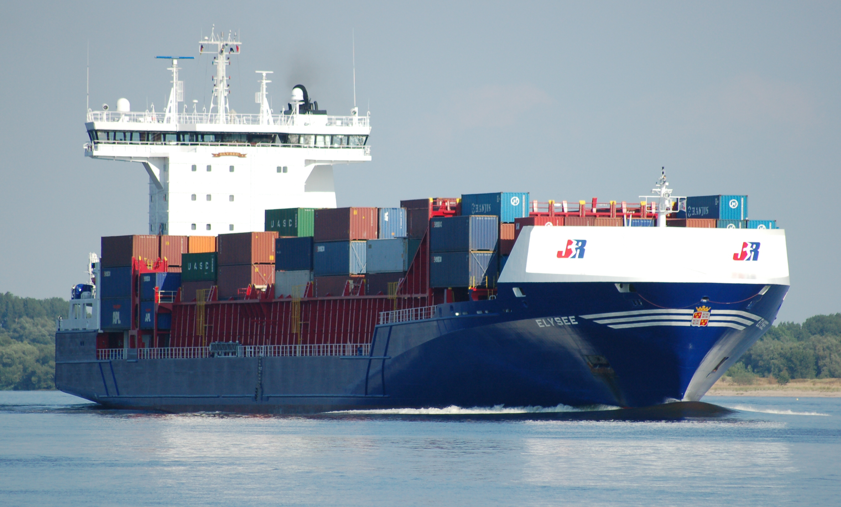 Das Containerschiff Elysee auf der Elbe bei Wedel. IMO-Nummer: 9462794 MMSI-Nummer: 246650000 Rufzeichen: PBWS Länge: 169.0m Breite: 27.0m Flagge: Niederlande